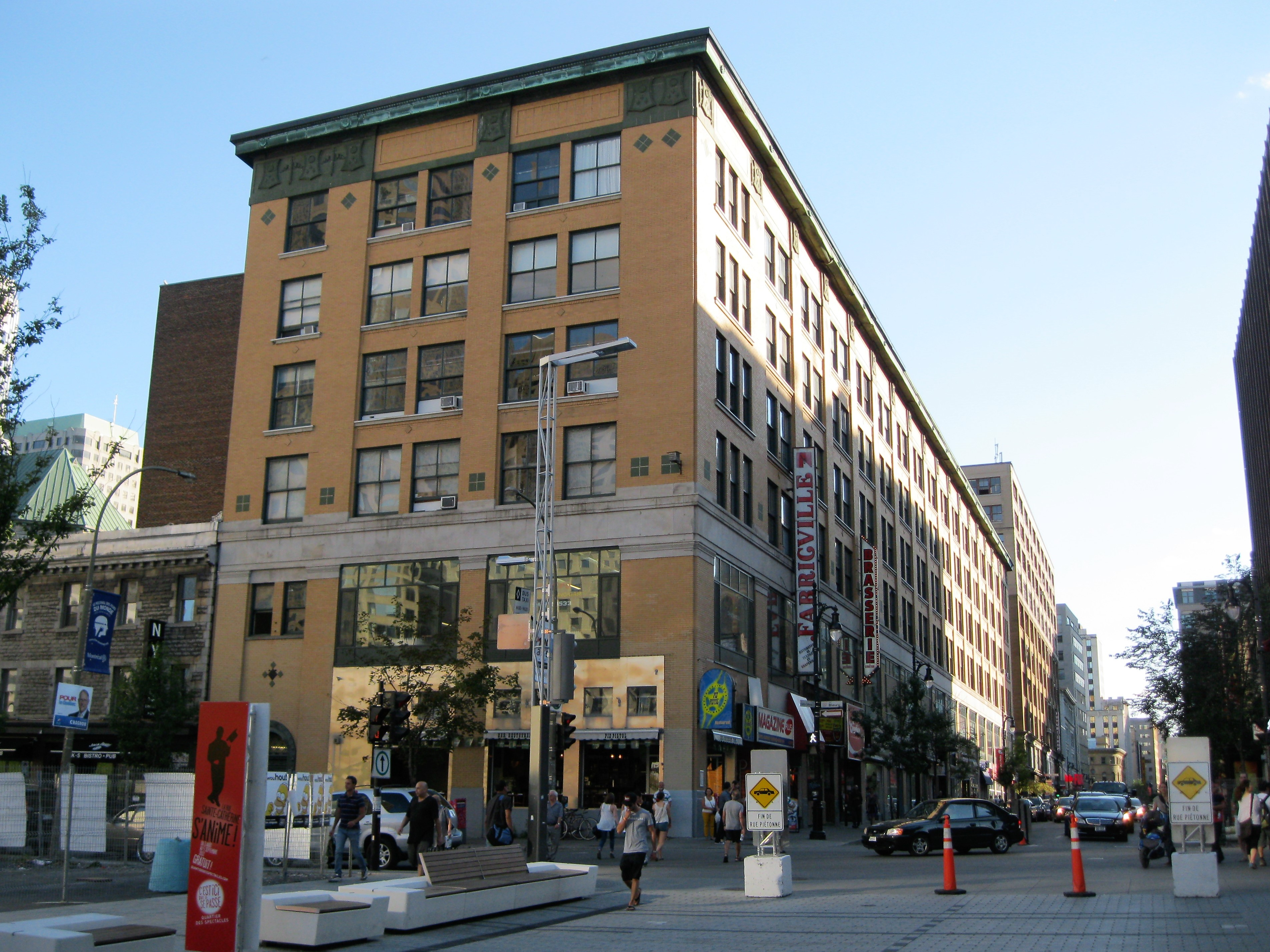 L'édifice Belgo est situé au 372 rue Ste-Catherine Ouest à Montréal.